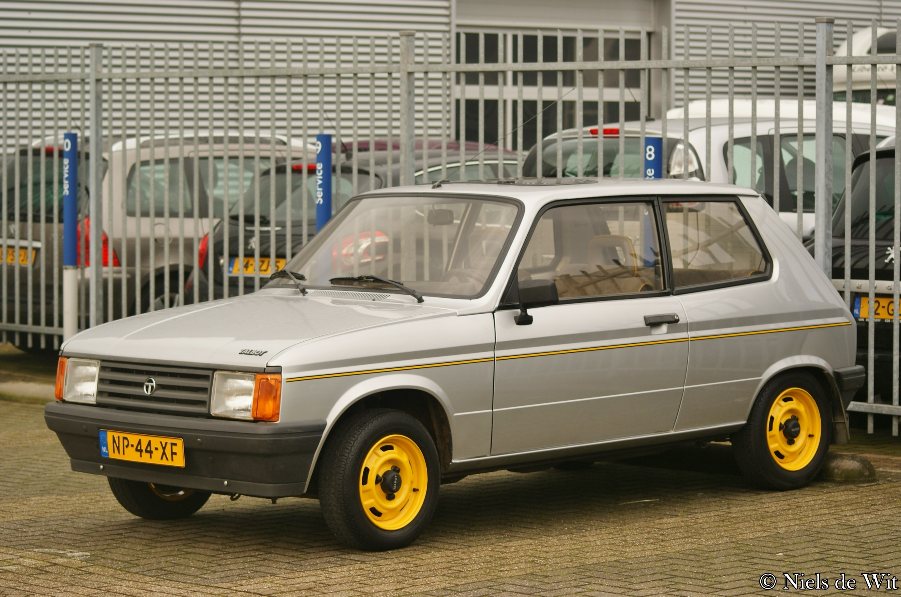 NP-44-XF